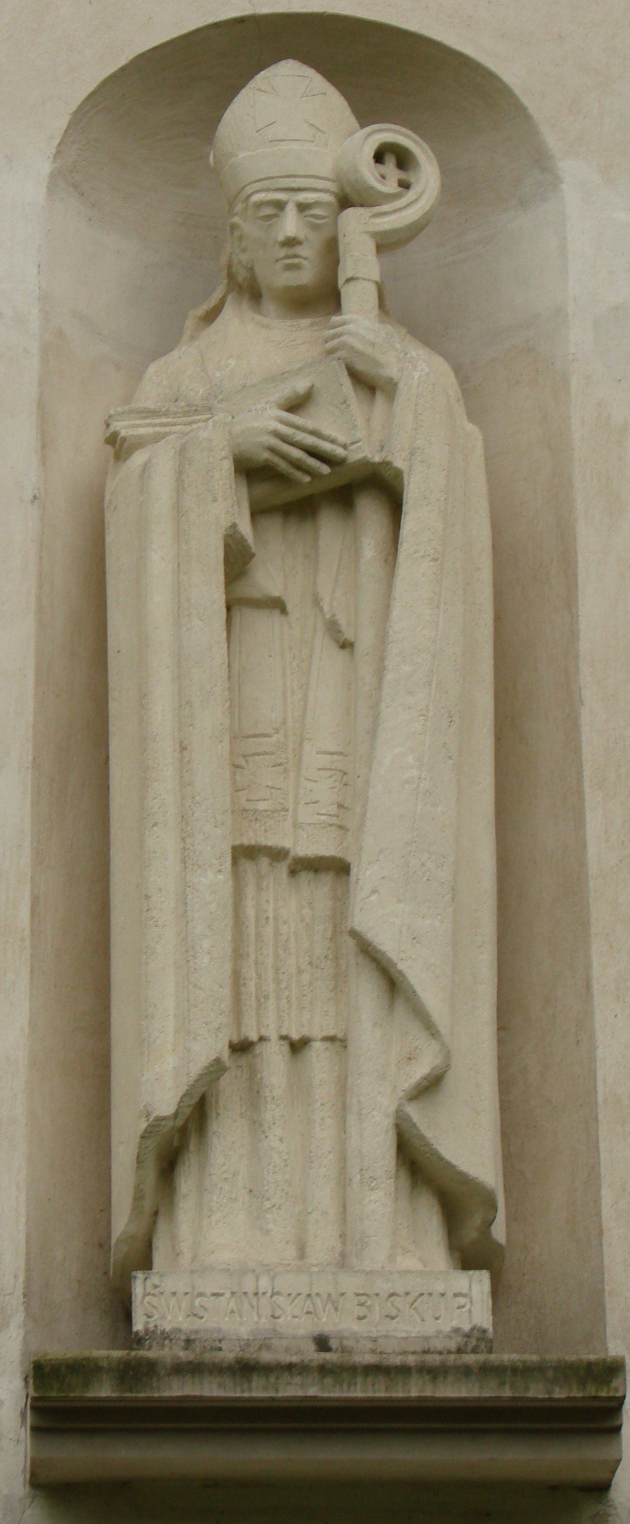 Sculpture of Stanisław from Szczepanów from Saint Joseph's church in Muszyna, Poland